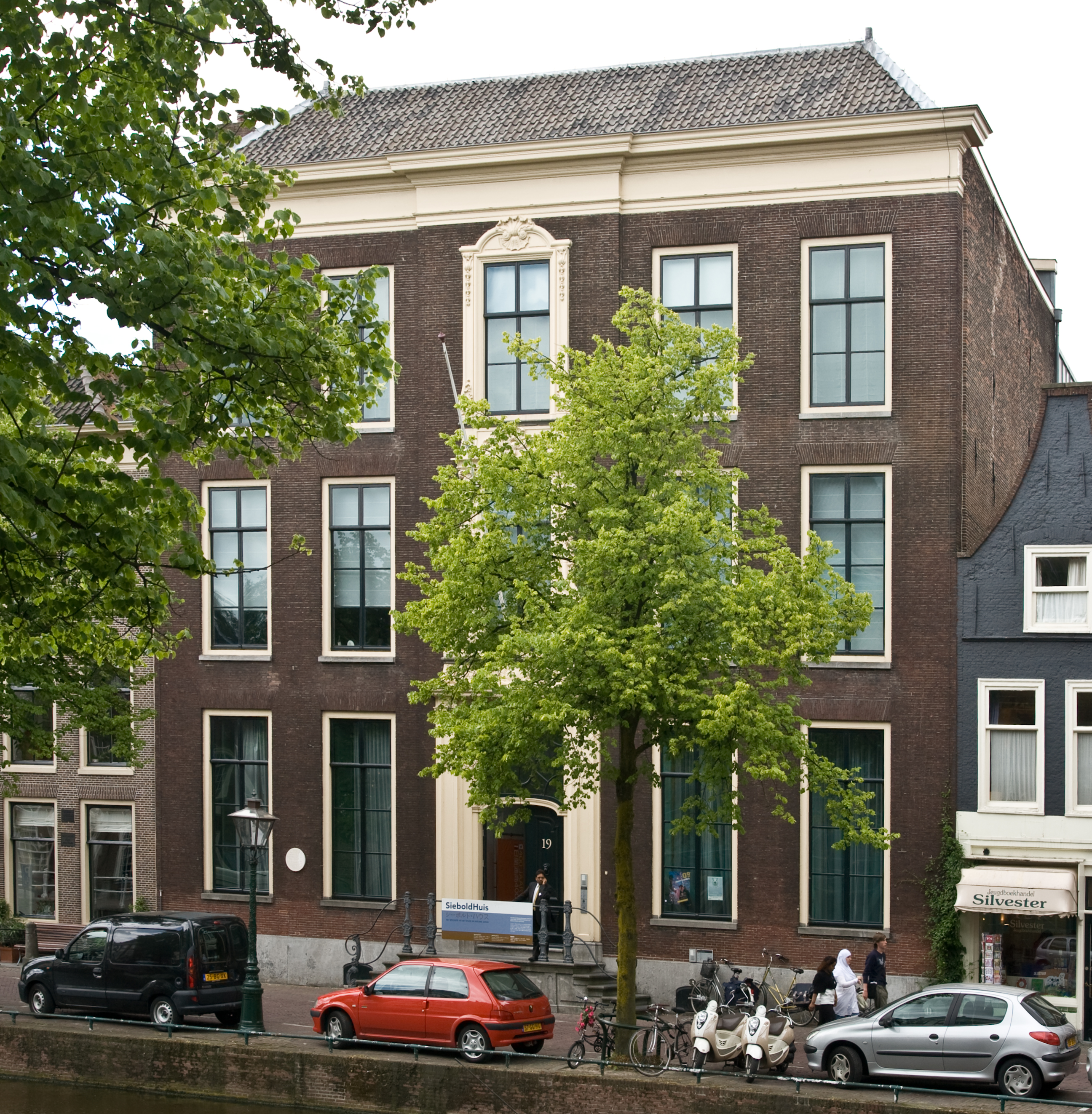 Museum Sieboldhuis, Leiden. Het Sieboldhuis heeft een erg mooie collectie Japanse kunst, prenten, kaarten, curiosa, geprepareerde dieren en planten, verzameld door Philipp Von Siebold (1796-1866), verzamelaar in Japan.